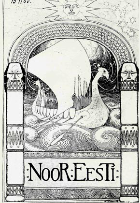 Обложка книги 1906 года издания